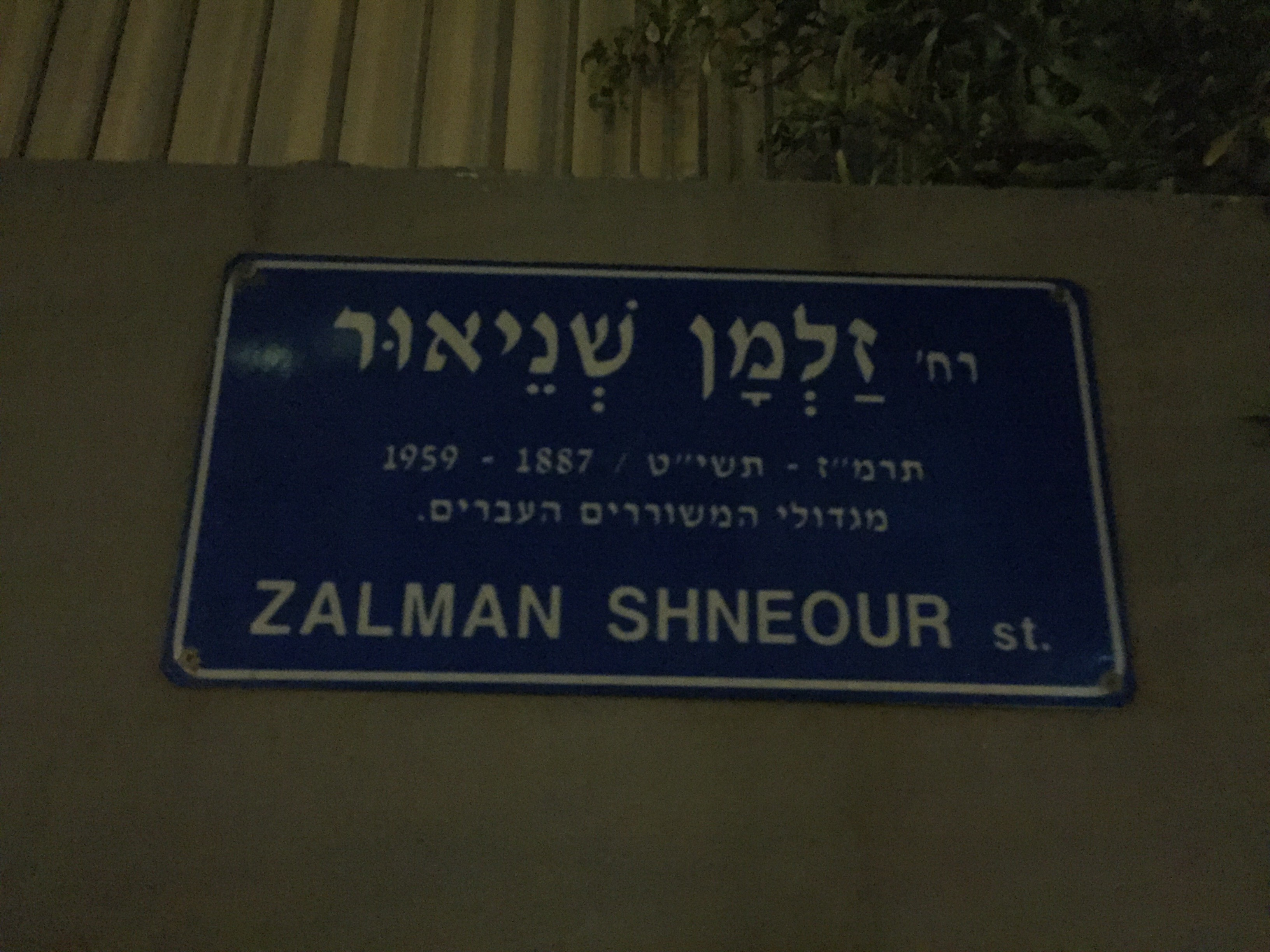 שלט רחוב בתל אביב עם שמו של זלמן שניאור